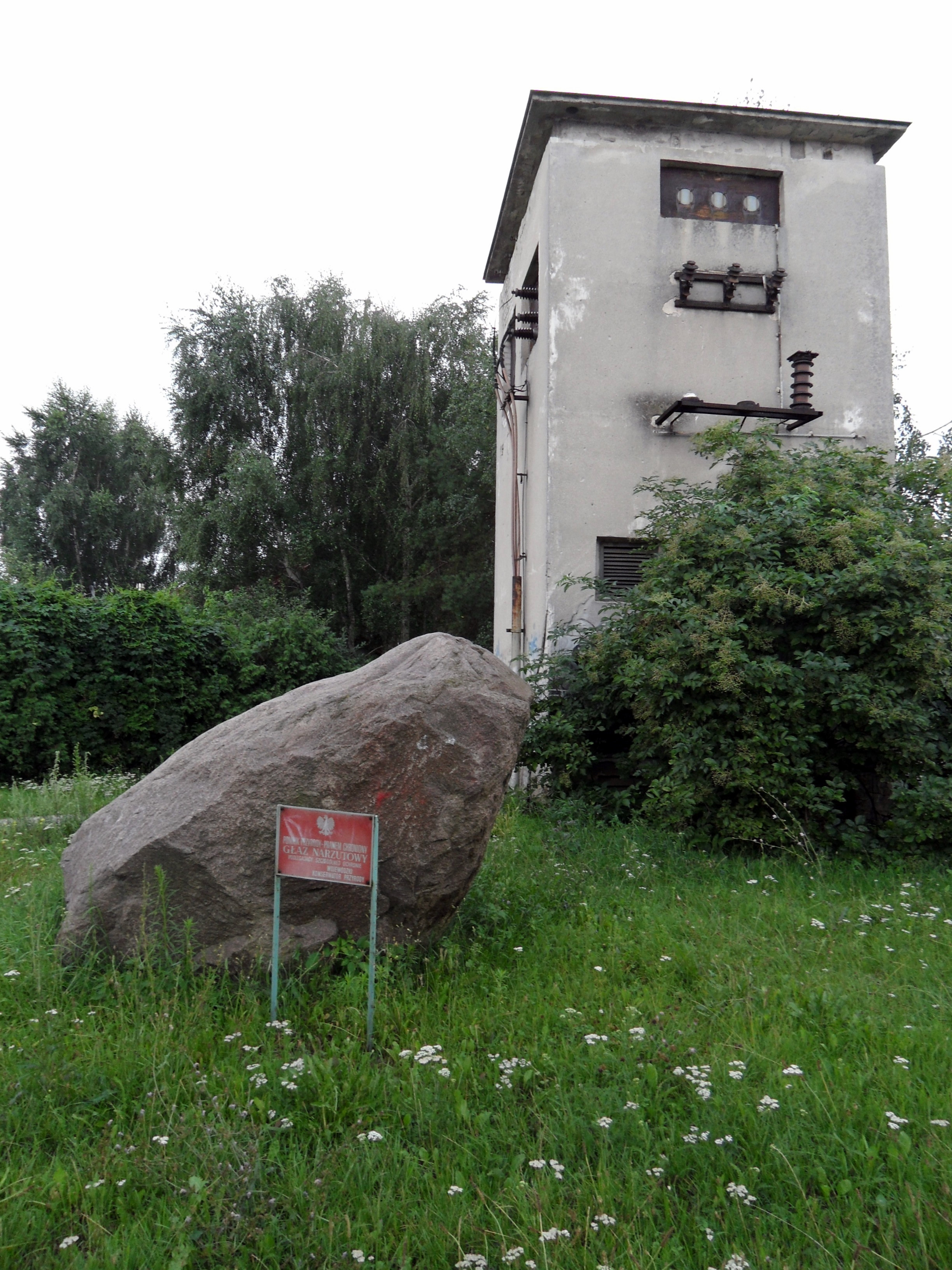 Głaz narzutowy w Ursusie przy skrzyżowaniu ul. Kompanii "Kordian" i ul. Regulskiej